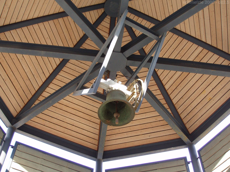 Blick in den Glockenturm der Katholischen Pfarrkirche Heilig Kreuz im Kreuzgrund in Heilbronn-Böckingen